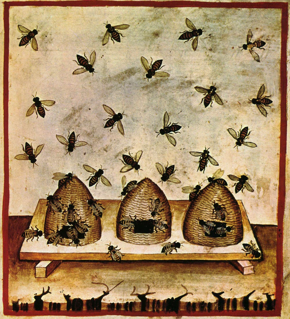 27-alimenti, miele